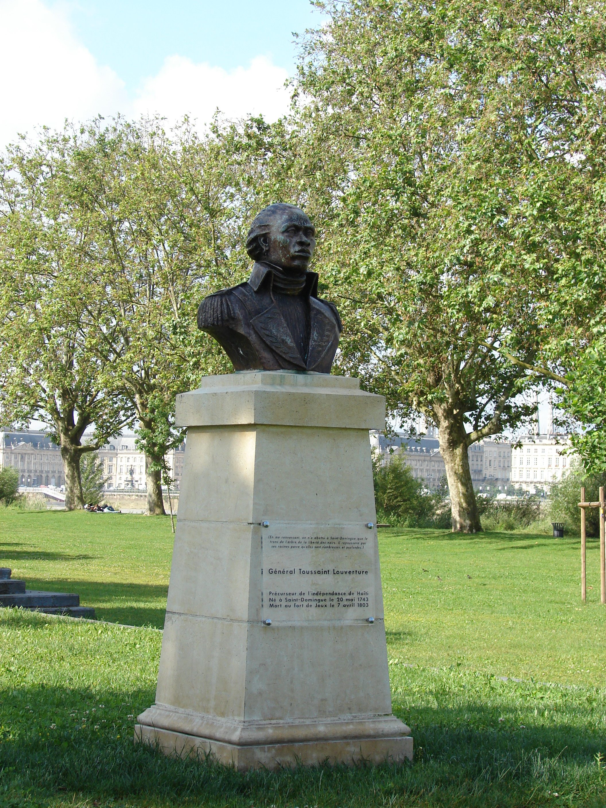 General Toussaint Louverture (1743-1803), Bordeaux, Aquitaine, France